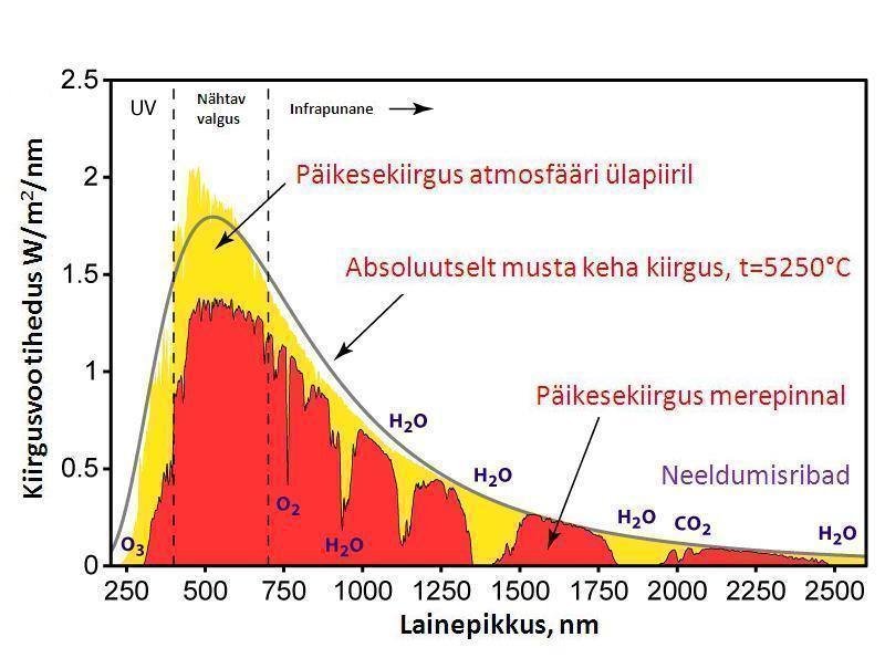 Päikese kiirgusvoo tiheduse muutumine atmosfääri läbimisel